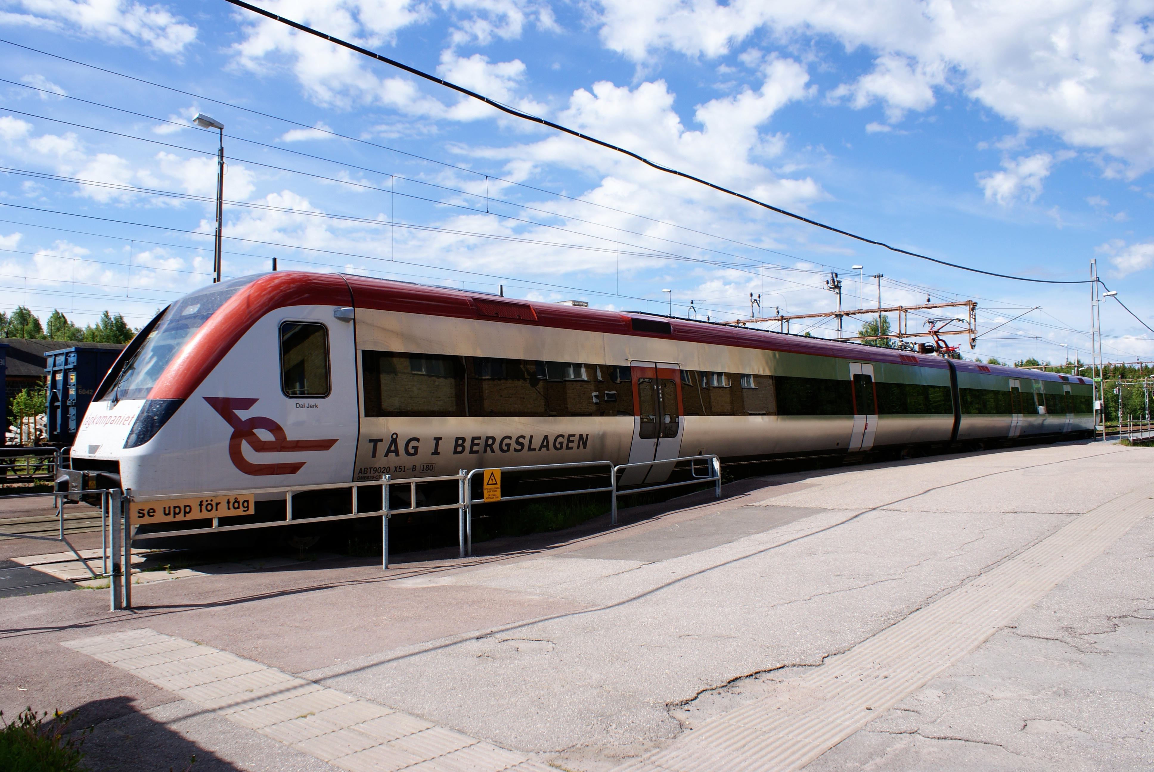 Tåg i Bergslagen vid Hofors station